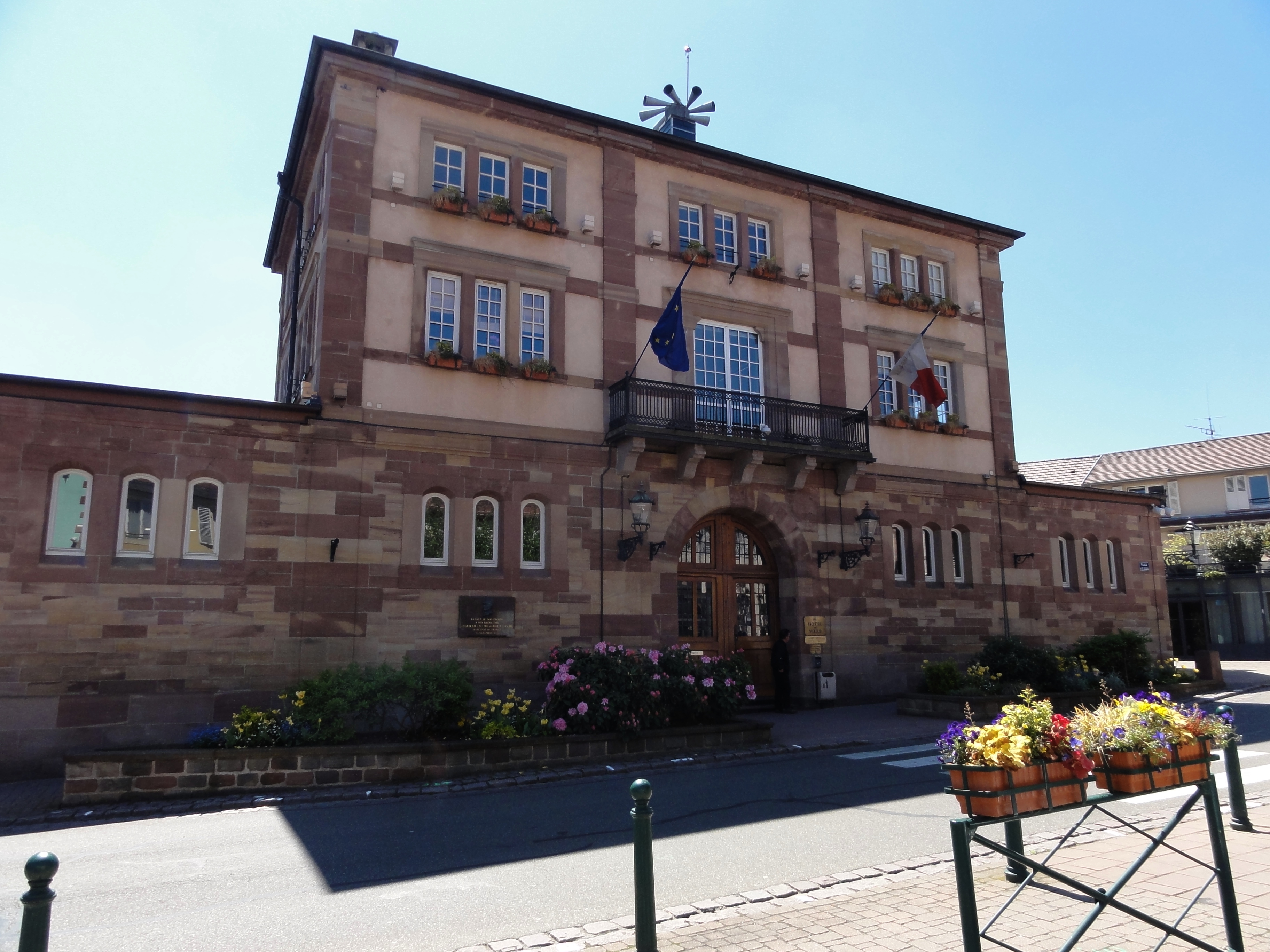 Alsace, Bas-Rhin, Wasselonne, Hôtel de ville (1852), place du Général-Leclerc.